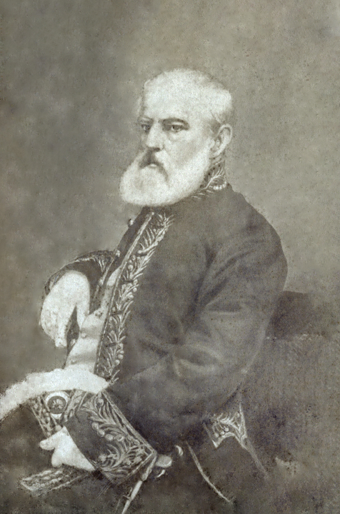 Antonio José de Irisarri Alonso (Guatemala; 7 de febrero de 1786 - Nueva York; 10 de junio de 1868) Militar guatemalteco/chileno que destacó en la independencia de Chile.